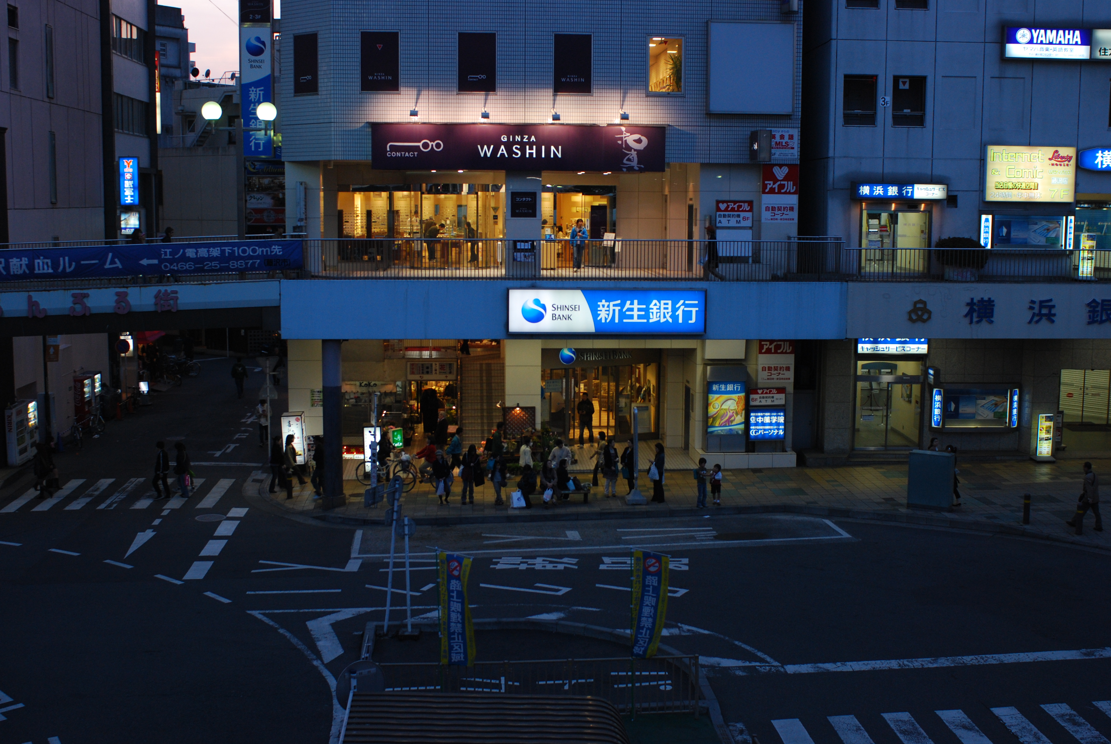 Fujisawa, near the Fujisawa station